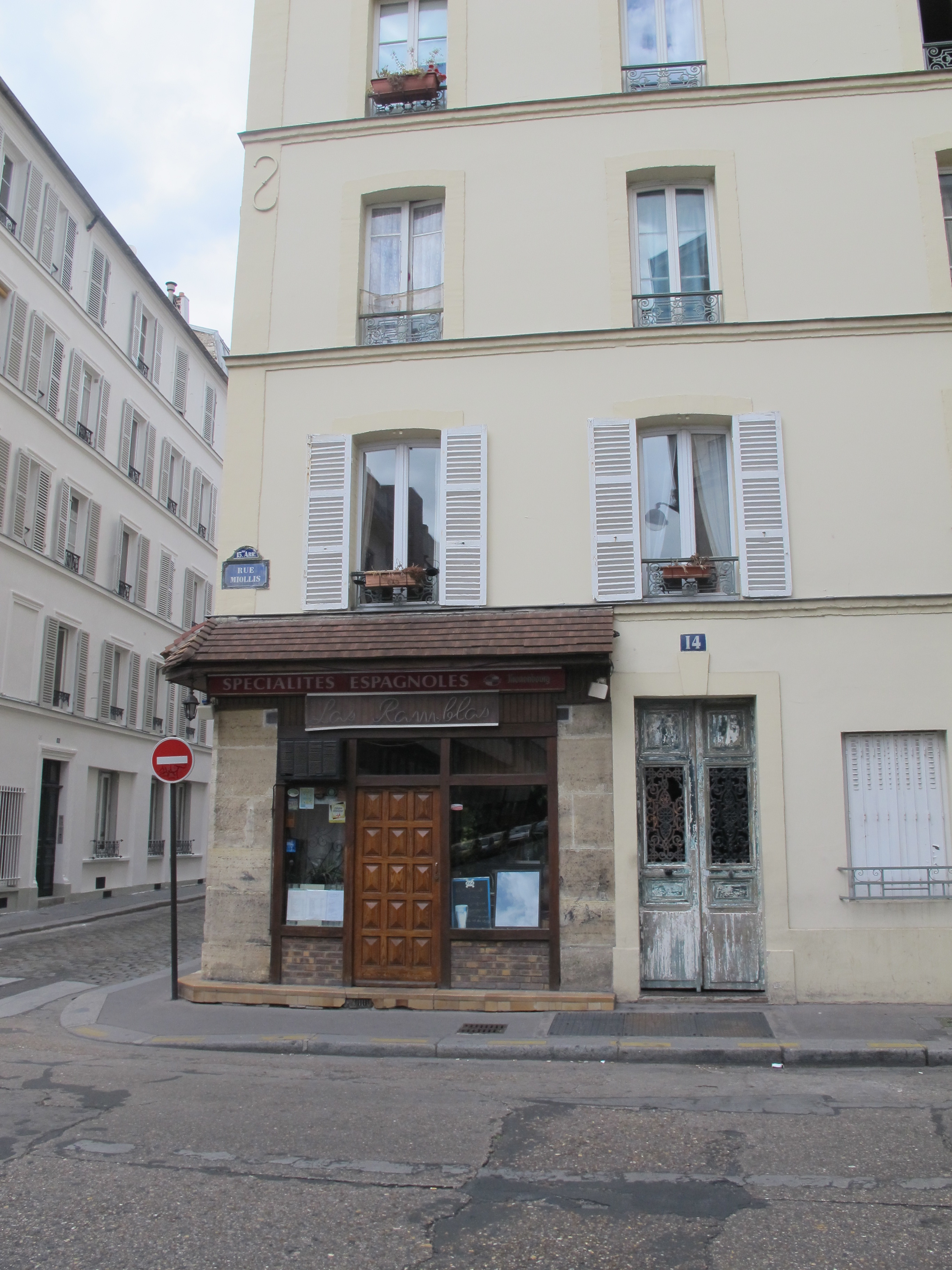 Croisement des rues parisiennes Miollis et Clouet.